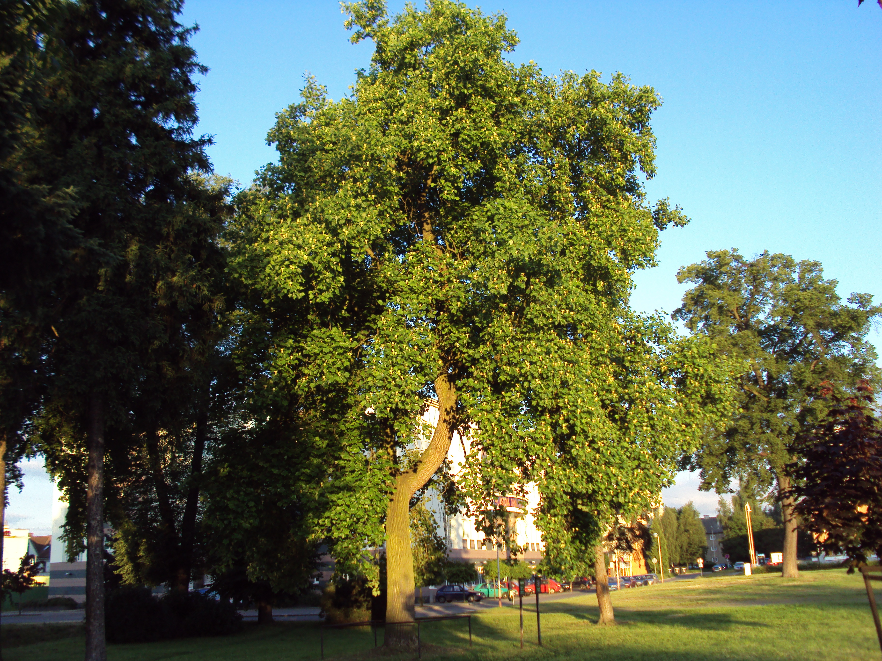 Česky: Památný strom Liliovník tulipánovitý u České spořitelny v České Lípě